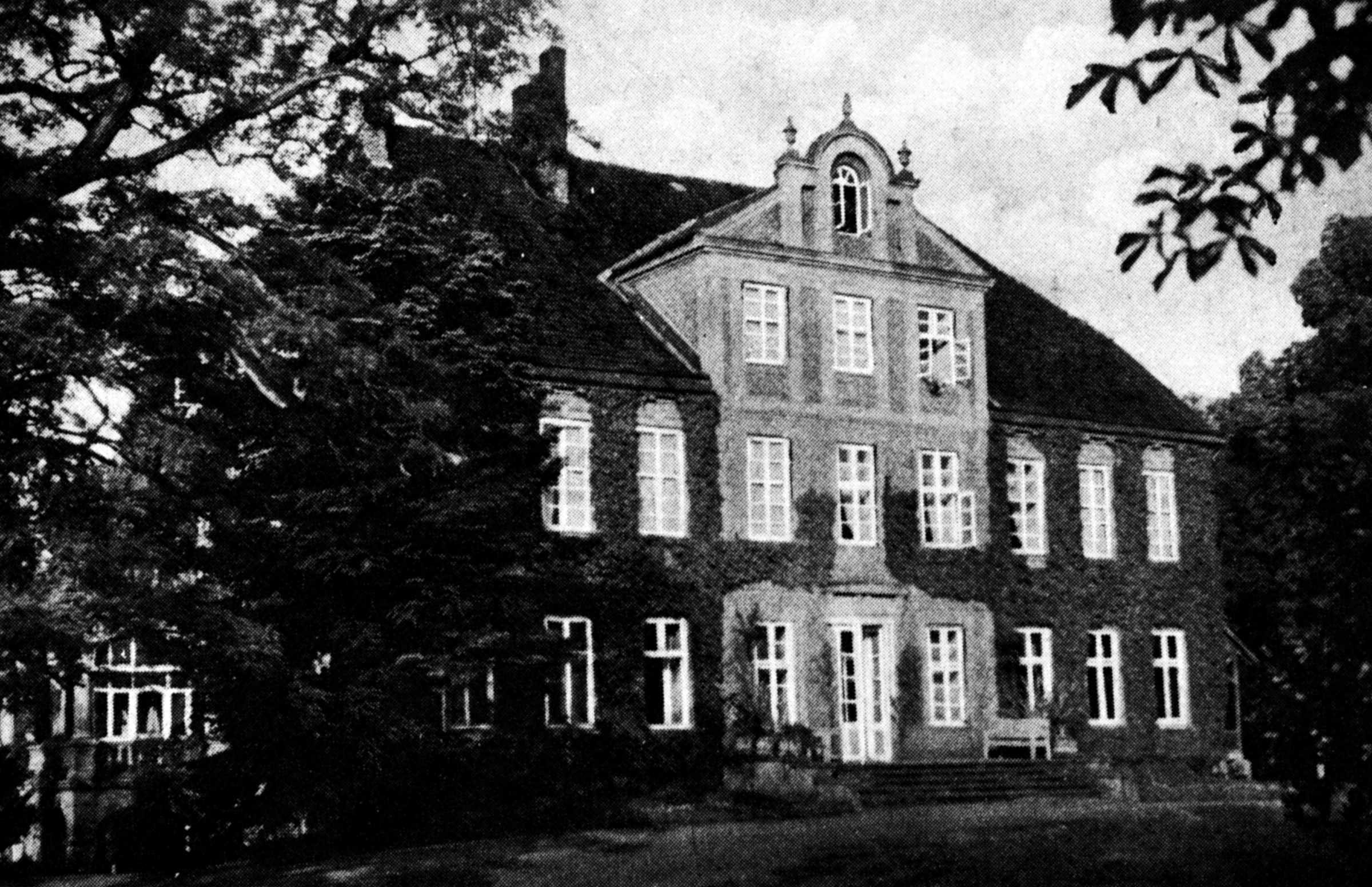 Herrenhaus Reez in Mecklenburg Datum: um 1900 Urheber: Gustav Freiherr von Plessen zu Dolgen (mutmaßlich) Quelle: privates Fotoarchiv der eigenen (mütterl.) Familie